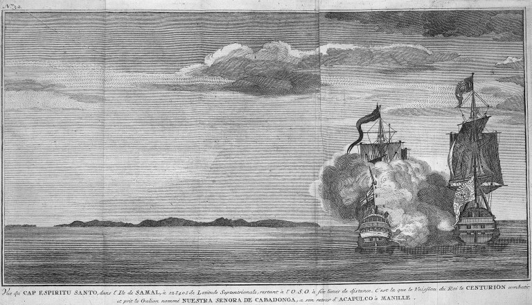 [Illustrations de Voyage autour du monde] Auteur : George Anson Éditeur : Henri-Albert Gosse et Compagnie (Genève) 1750